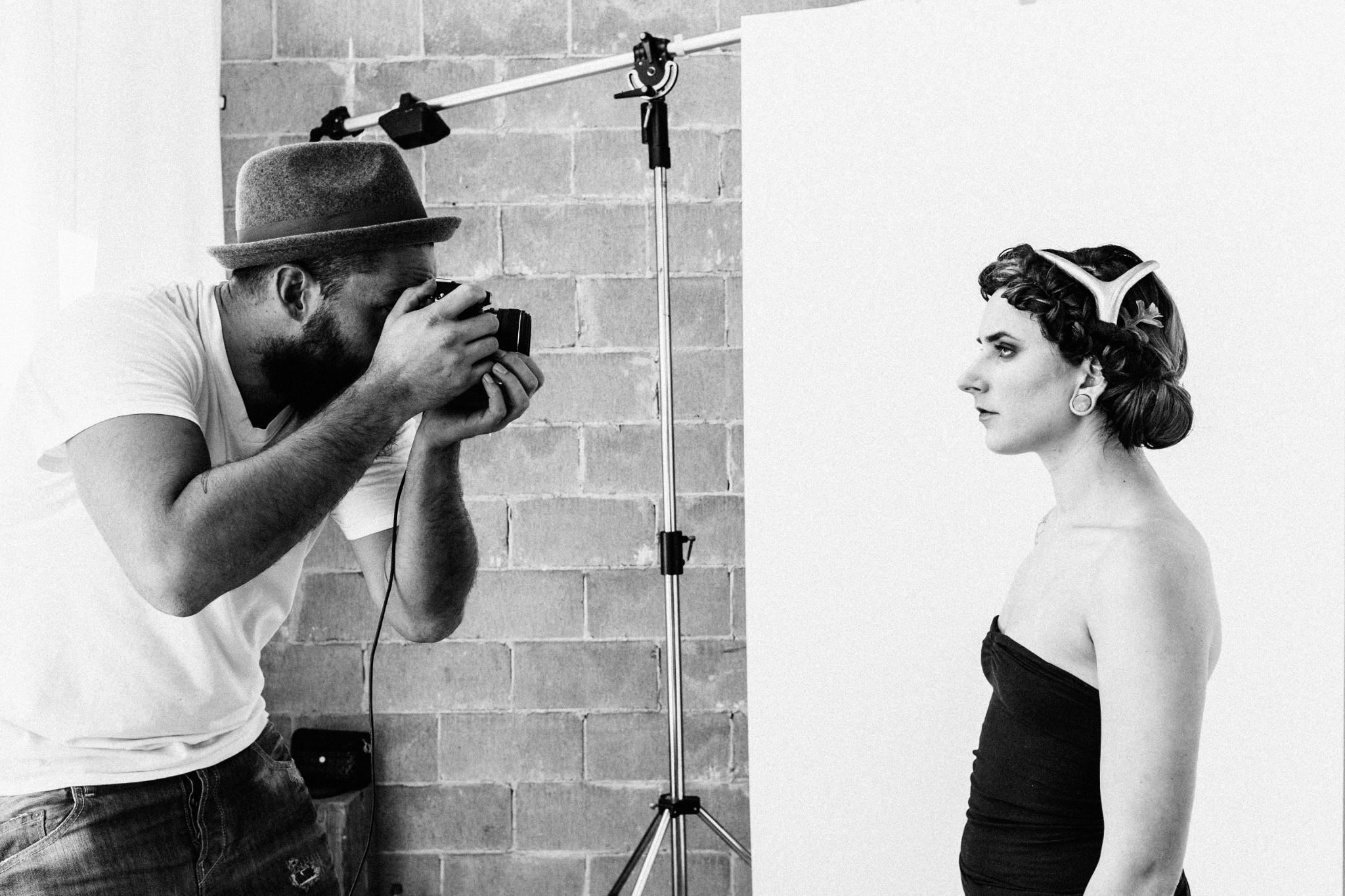 Фотограф и модель